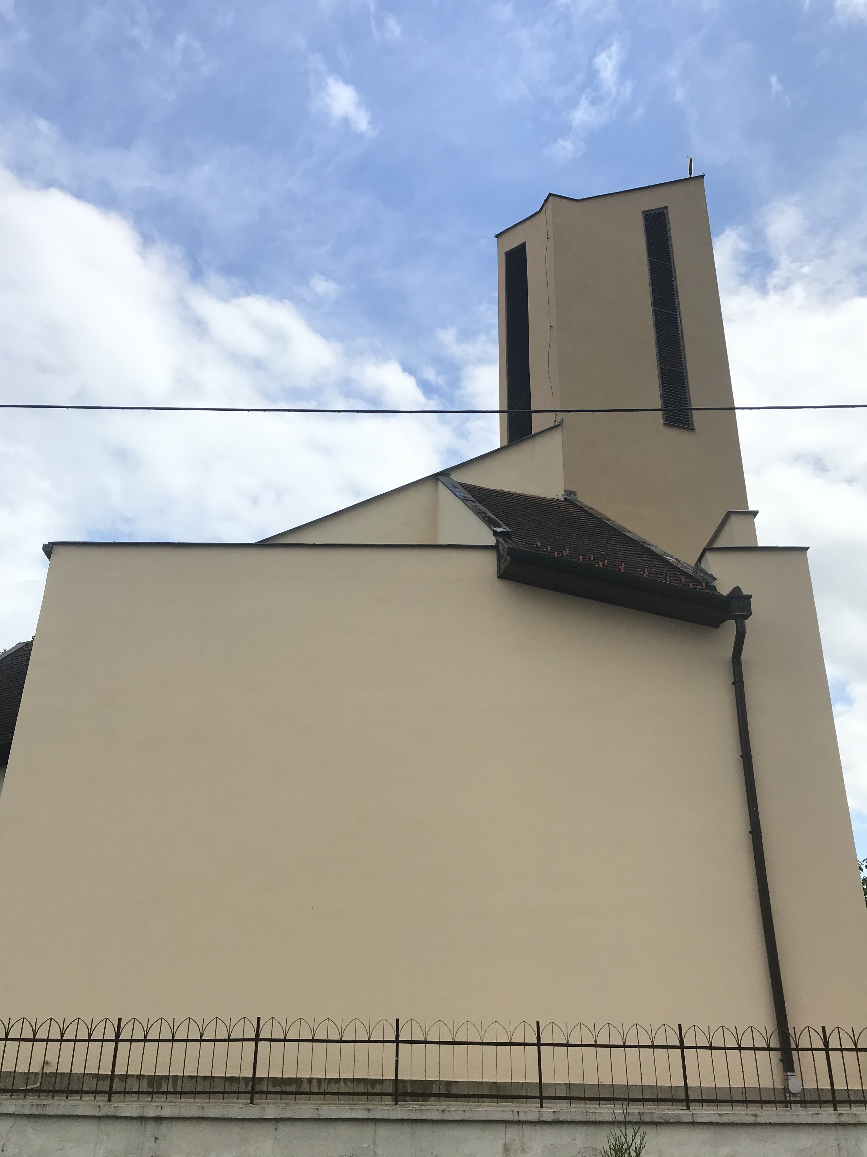 Jižní pohled Kostola svatého Jana Křtitele (Šebastovce)